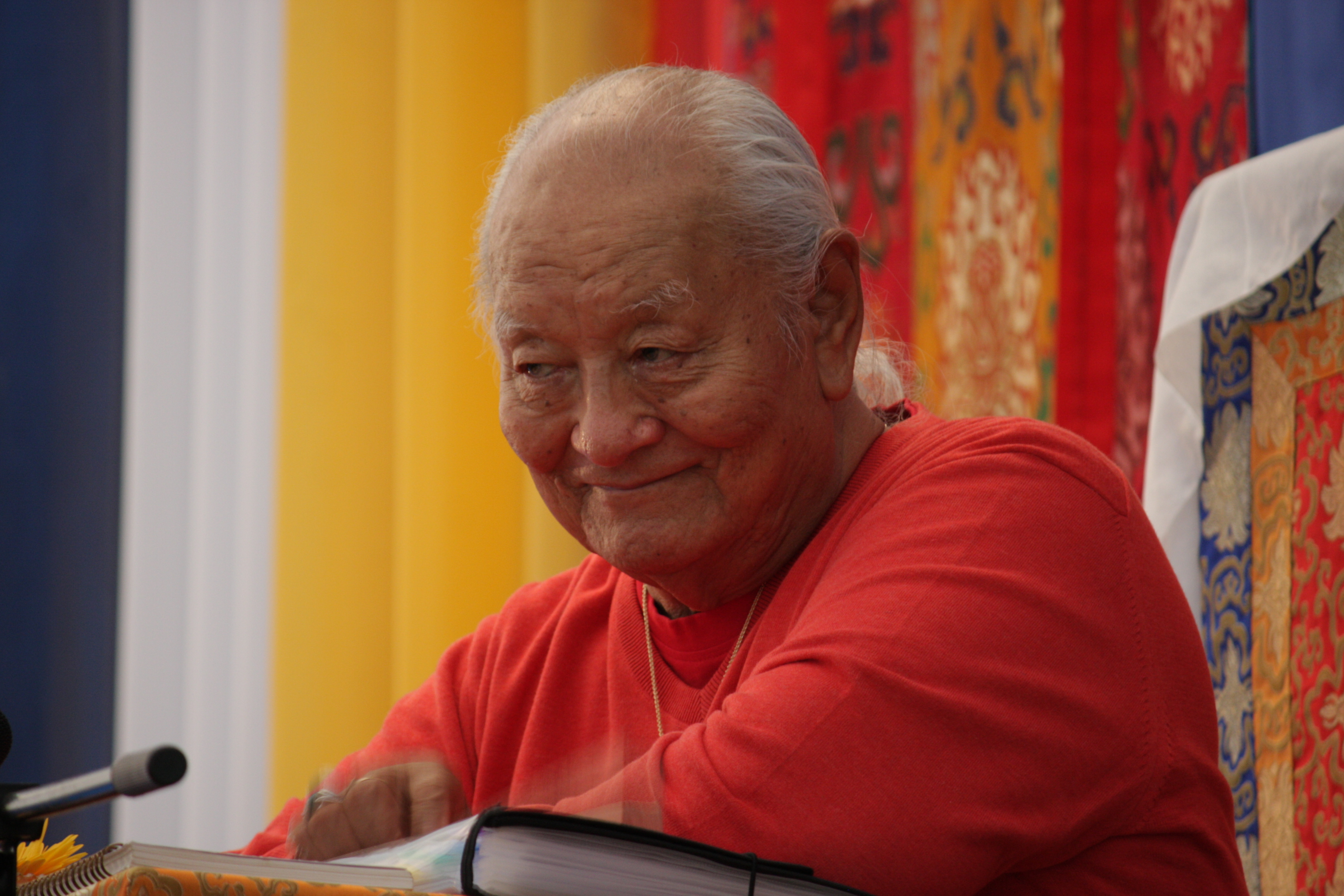 Чогьял Намкай Норбу Ринпоче Северный Кунсангар 04 июля 2013